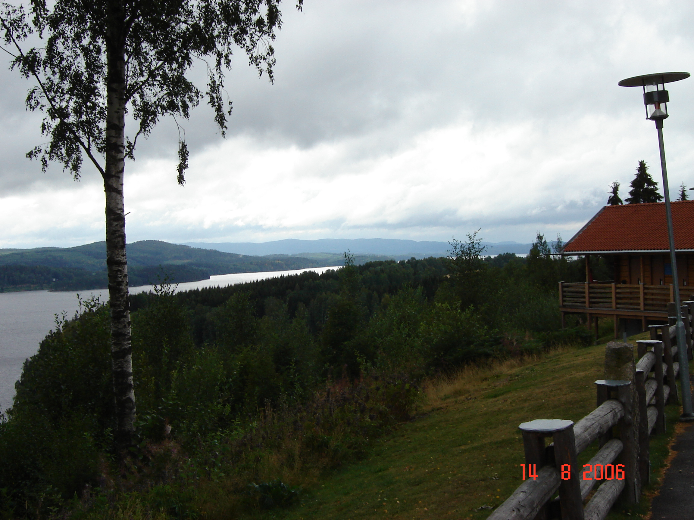 View from the "Tossebergsklätten rastplats"